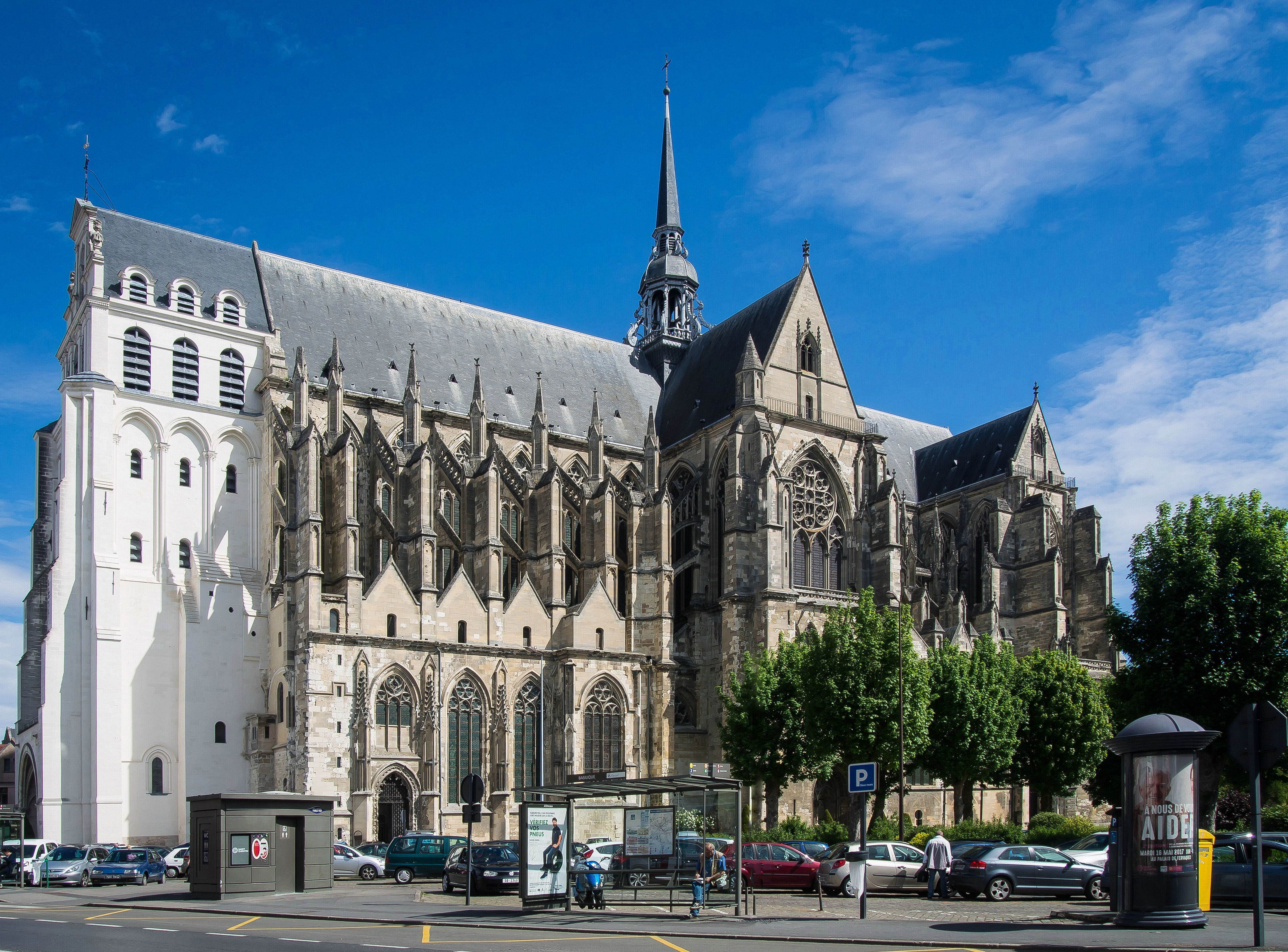 St. Quentin, Basilika, Südseite